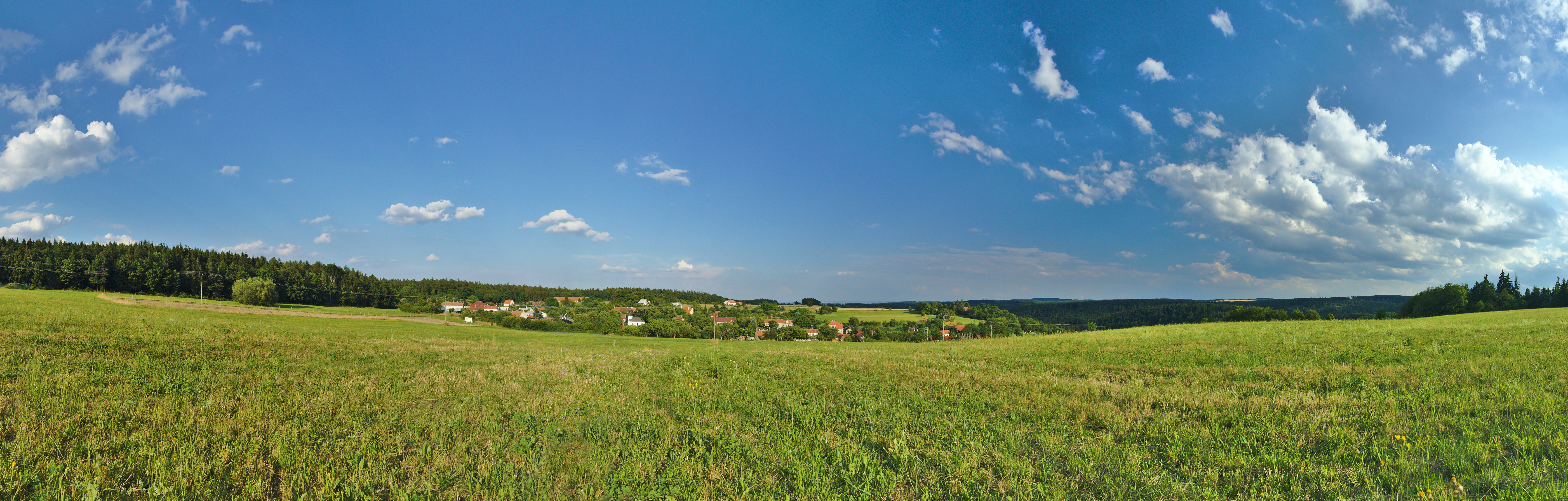 Panorama obce Seč od západu, Lipová, okres Prostějov